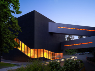 Deutsches Bergbaumuseum, Bochum